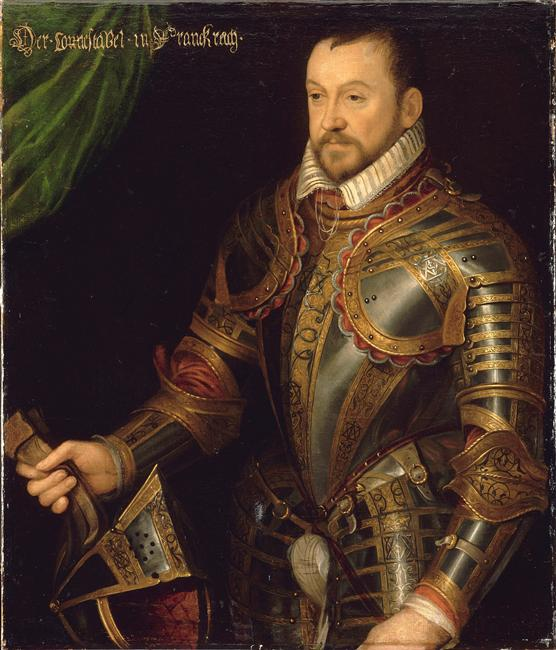 François, duc de Montmorency, maréchal de France.